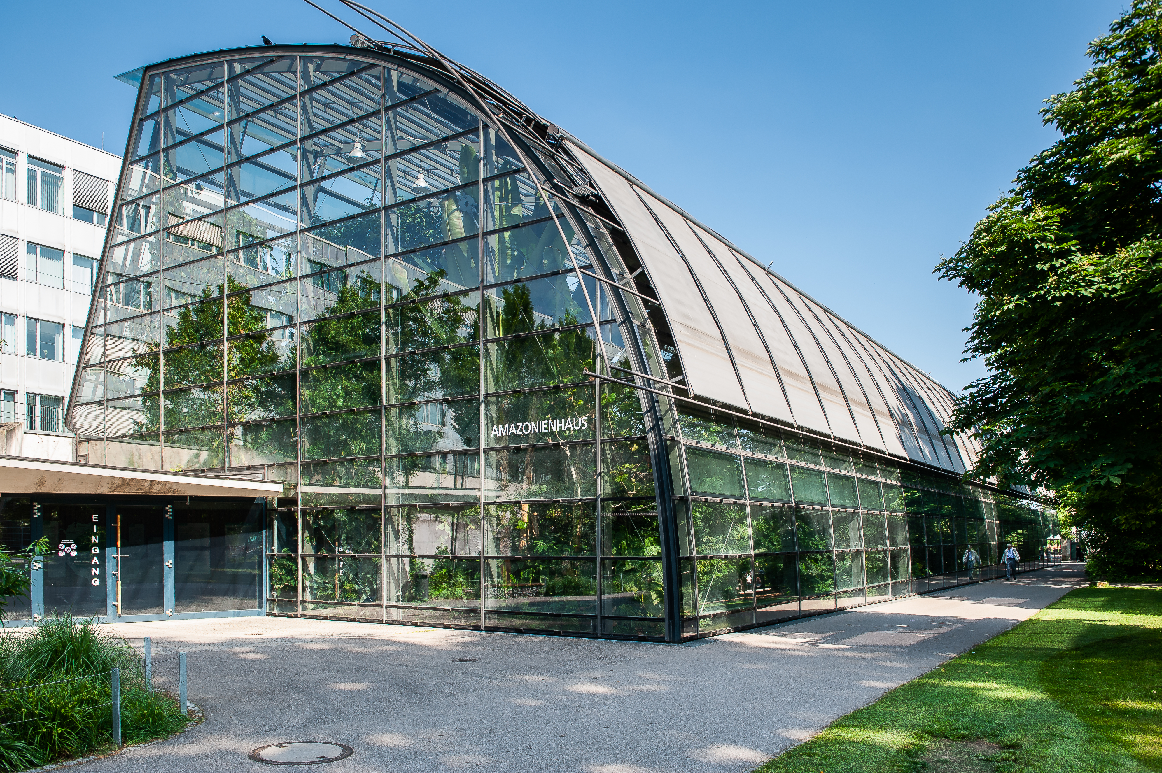 Wilhelma Stuttgart, Amazonienhaus